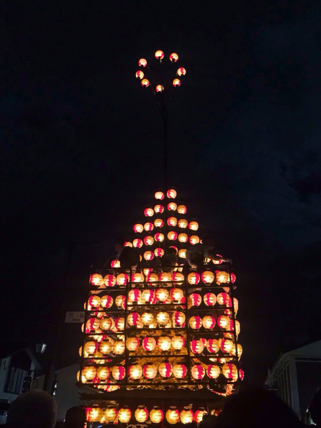 二本松ちょうちん祭り